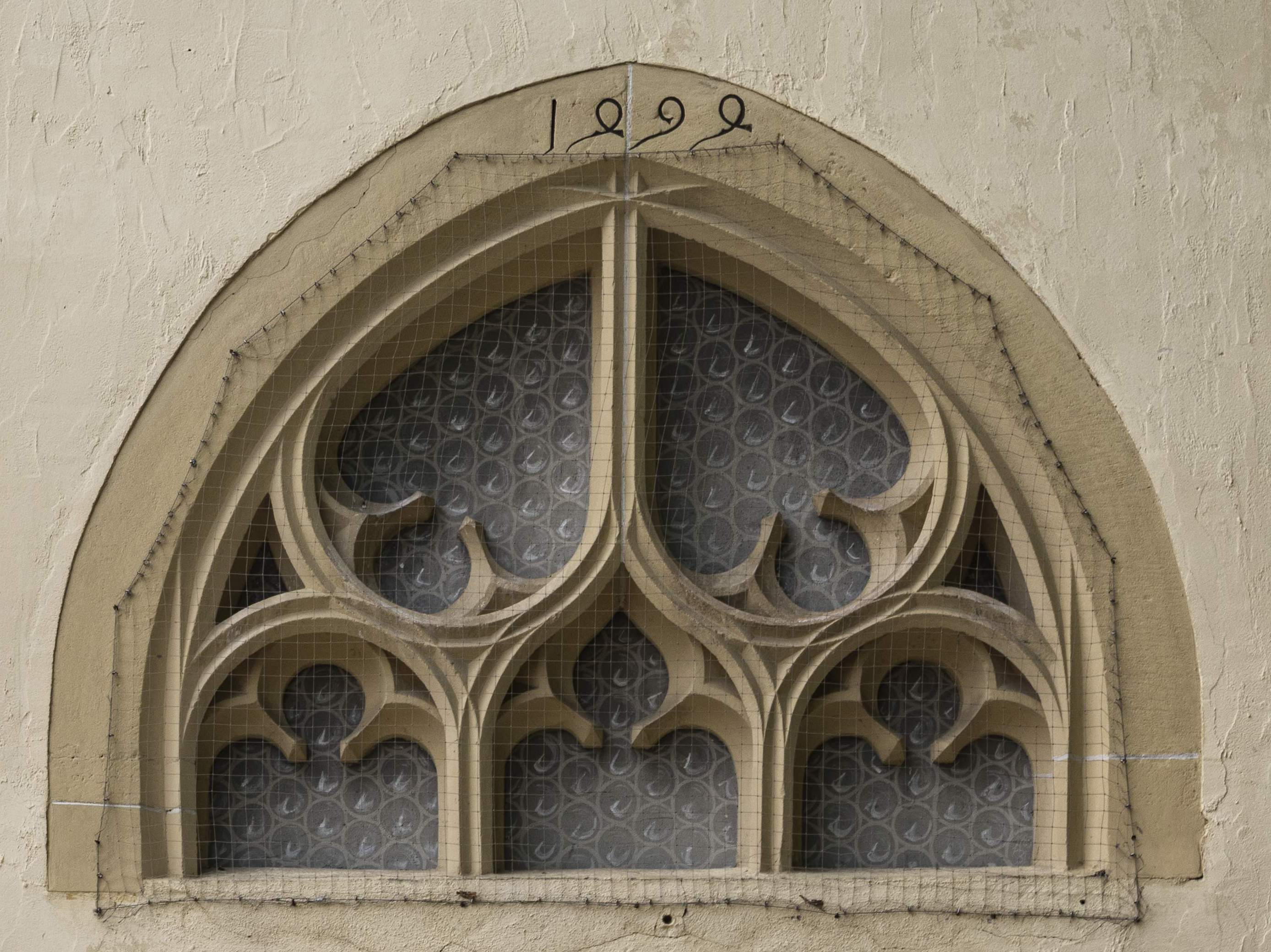 Katholische Pfarrkirche in Sölden bei Freiburg